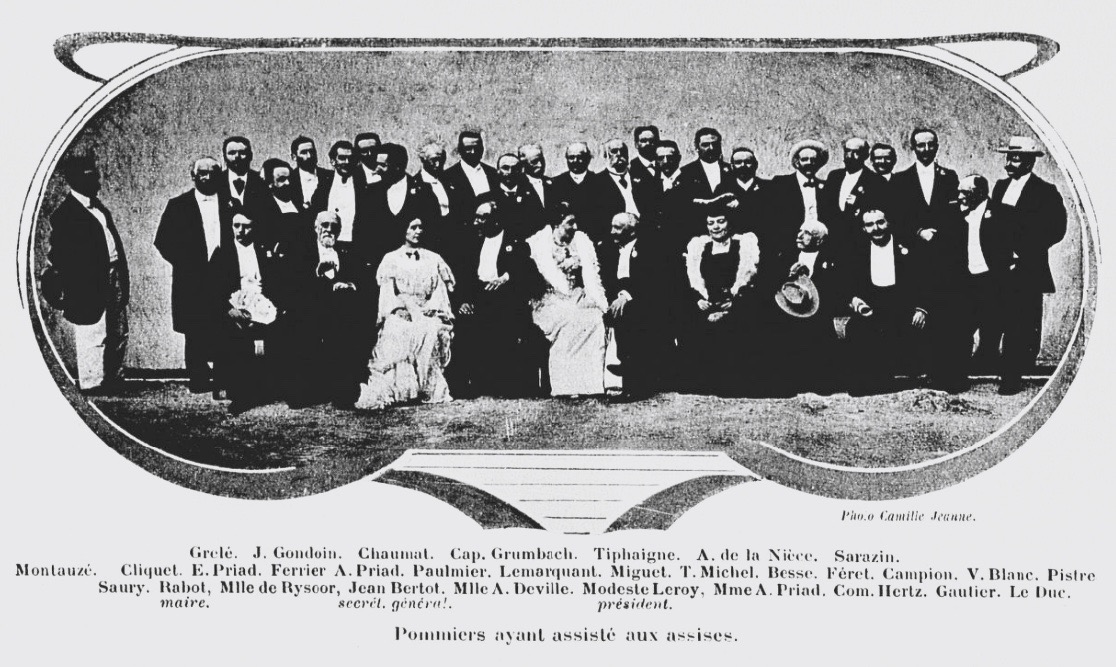 Membres de la Société littéraire et artistique "La Pomme", aux assises de Falaise en 1904, et notamment son secrétaire général Jean Bertot.